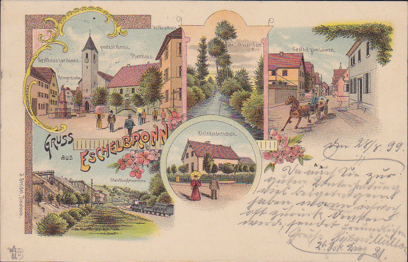 Vorderseite einer historische Postkarte des Malers J. Steidel aus Daisbach. Sie zeigt verschiedene Ansichten der Gemeinde Eschelbronn Vorderseite Rückseite